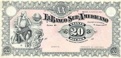 20 эквадорских сукре. Выпуск Banco Sur Americano, Эквадор. Аверс. Христофор Колумб. "Колумбу за его открытия был пожалован герб, на котором "замок Кастилии и лев Леона соседствовали с изображениями открытых им островов, а также якорей -- символов адмиральского титула". Энциклопедия для детей. Том 3. География. М.: Аванта+, 1994, с. 82